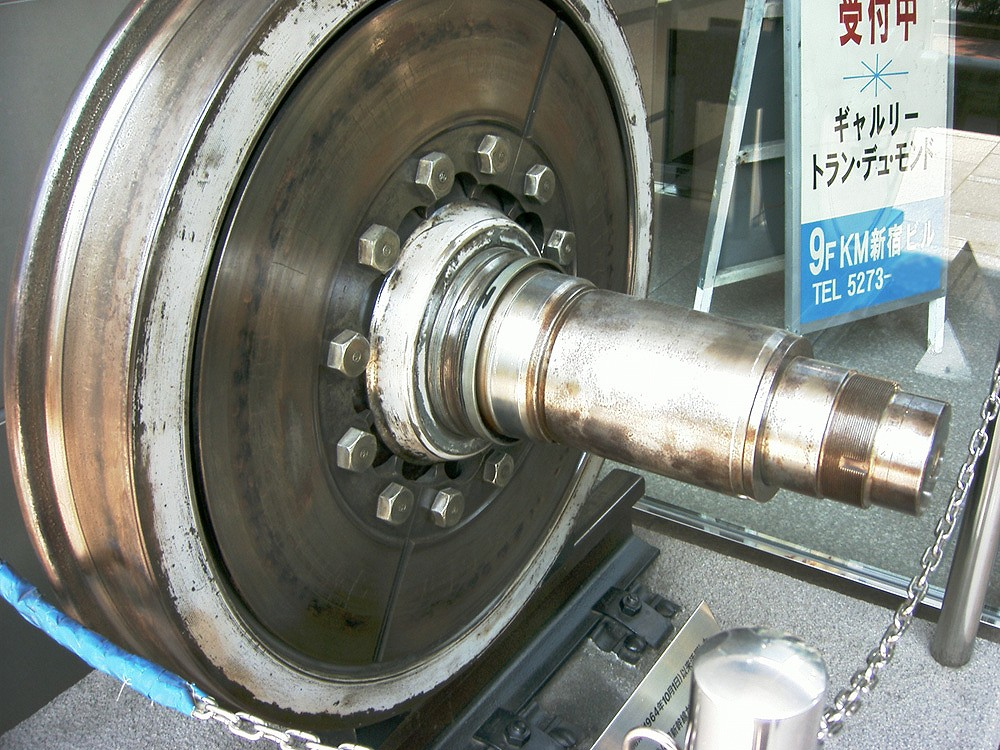 0_Series_Shinkansen_Wheel Tokyo Japan